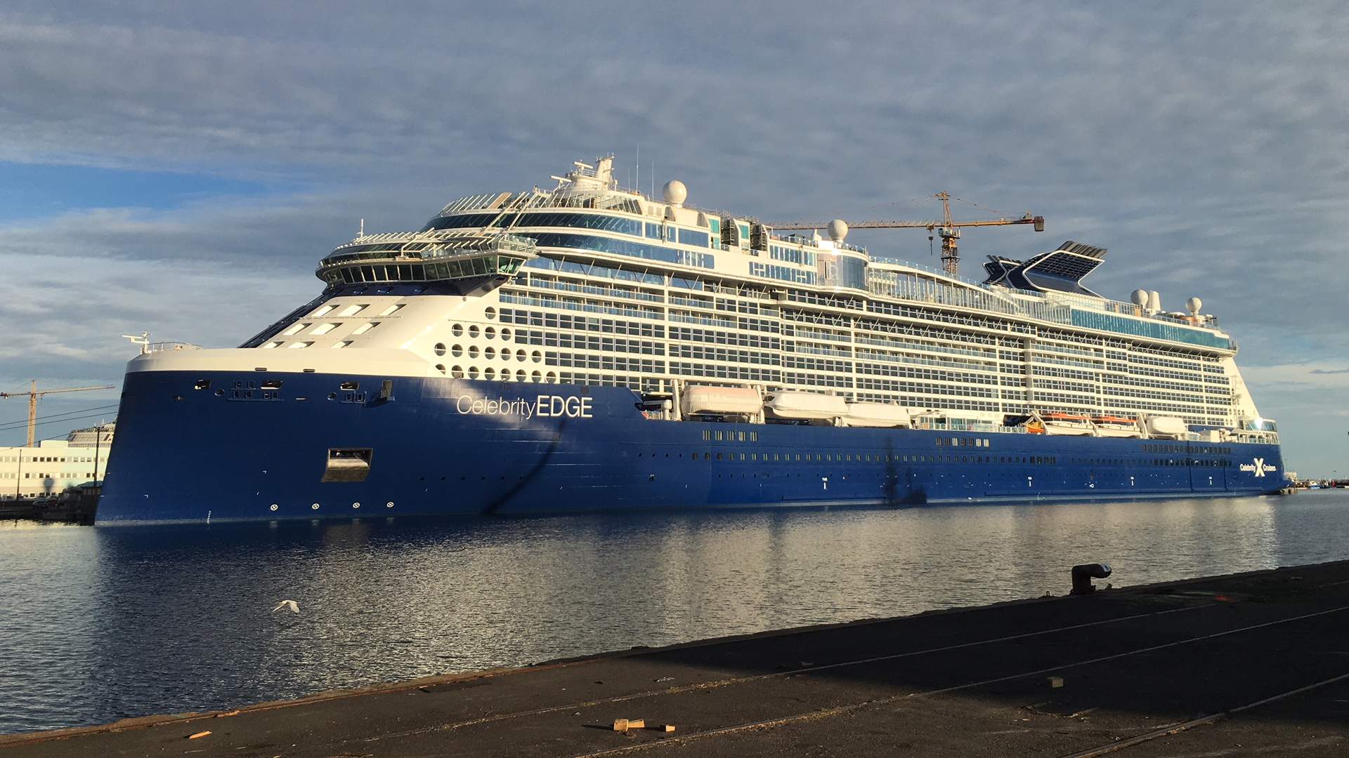 Le Celebrity Edge attend paisiblement sa livraison à Saint Nazaire